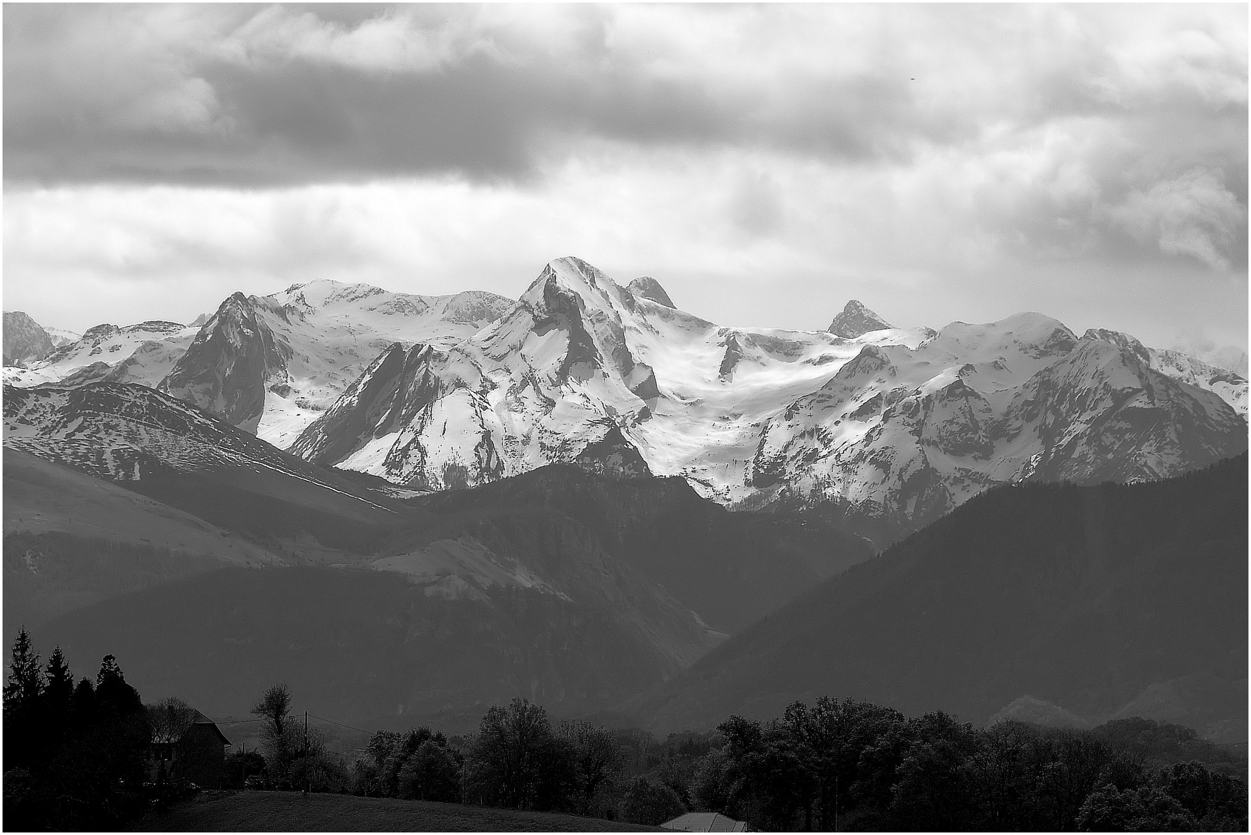 Le pic du GER depuis les coteaux de Cuqueron